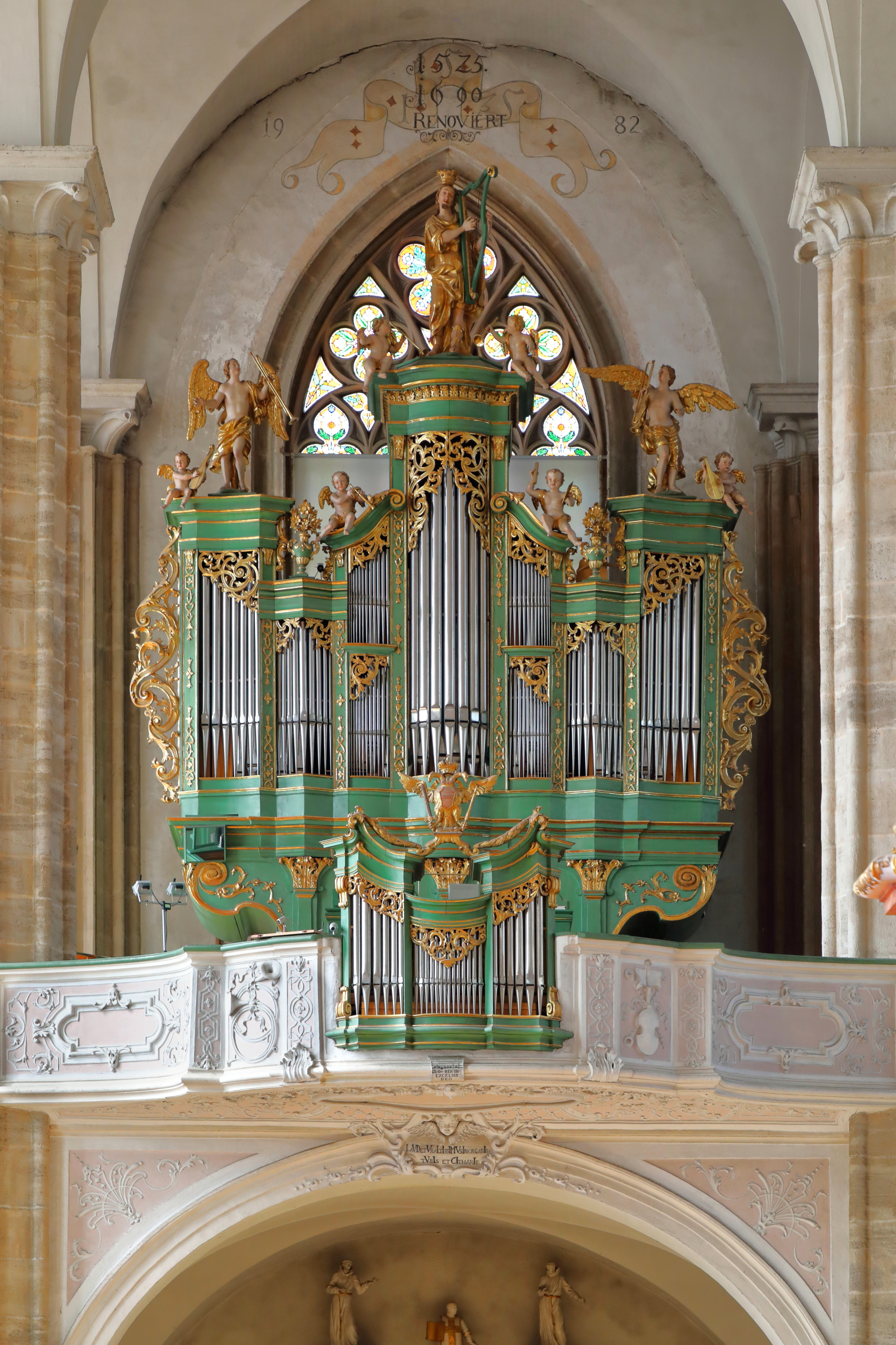 Die spätbarocke Orgel der röm.-kath. Pfarrkirche St. Othmar in der niederösterreichischen Stadt Mödling.Im Jahr 1727 wurde vermutlich von Joseph Wiebel eine einmanualige Orgel mit Pedal errichtet. 1777 erweiterte der Orgelbaumeister Franz Xaver Christoph die Orgel um ein Rückpositiv auf der Brüstung und vergrößerte das bestehende dreiteilige Orgelgehäuse. 1983 wurde von Orgelbau Michael Walcker-Mayer in das bestehende denkmalgeschützte Gehäuse eine komplett neue dreimanualige Orgel mit mechanischer Traktur eingebaut und das 1929 deaktivierte Rückpositiv wieder aktiviert. In den Jahr 2001 und 2005 erfolgten kleinere Umbauarbeiten, so dass die Orgel anschließend 34 Register mit insgesamt 2.226 Pfeifen hatte.